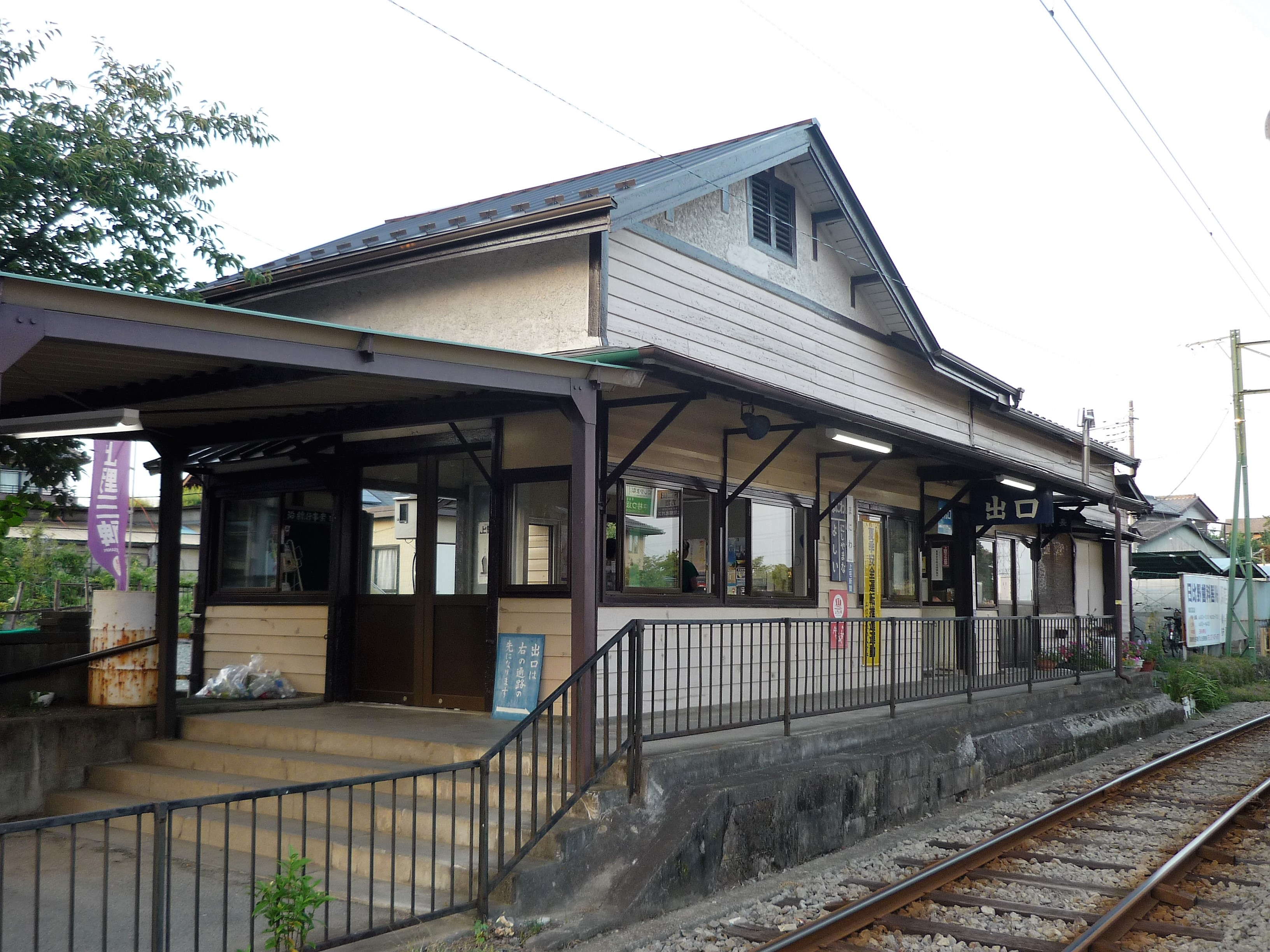 上信電鉄 馬庭駅駅舎（ホーム側から） Panasonic Lumix DMC-FS3